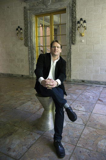 Fabrice Jaumont (juin 2016)